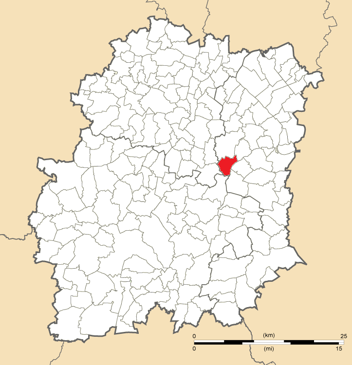 Carte de position de Vert-le-Petit en Essonne (91)